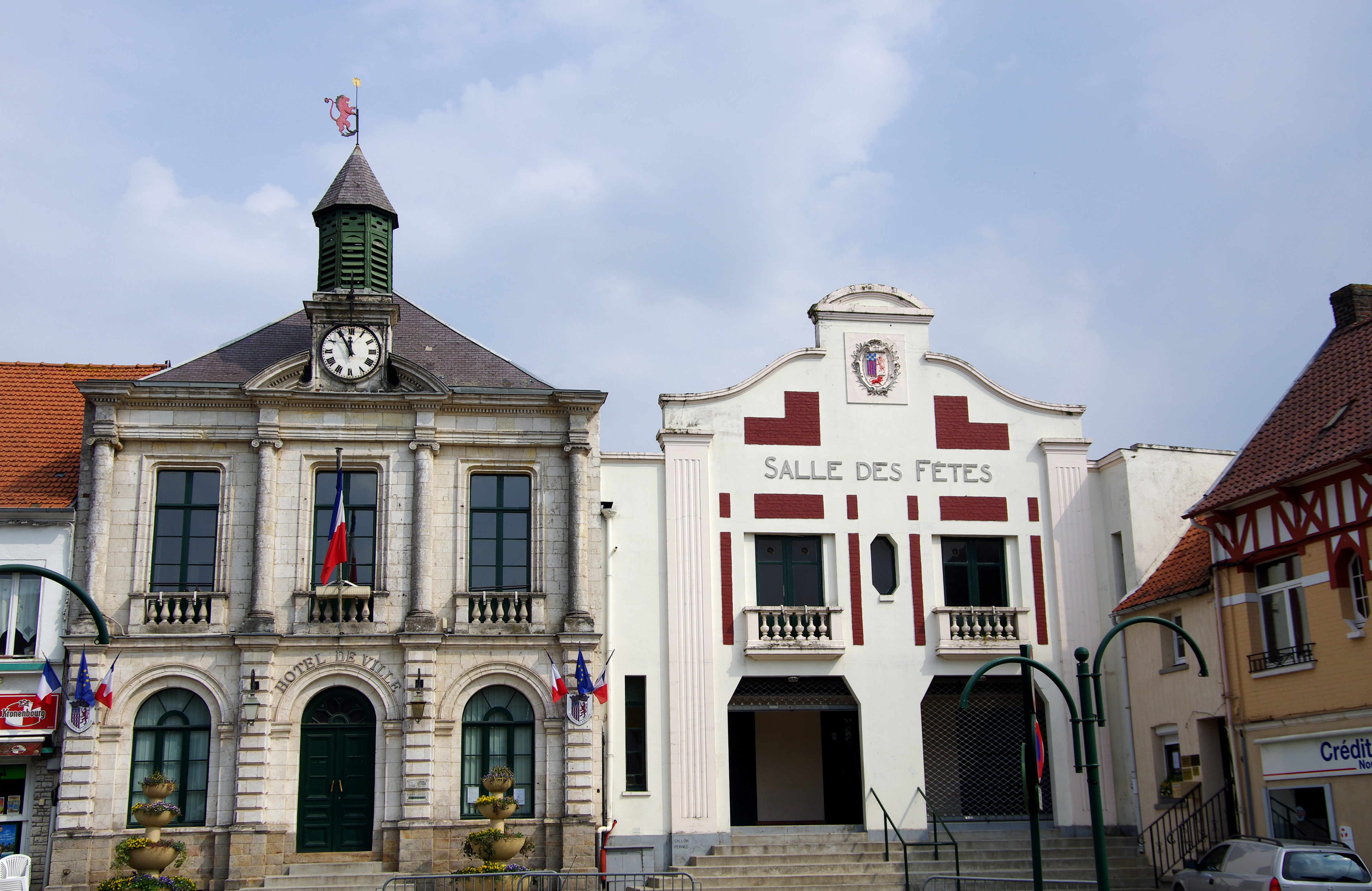 Pernes (Pas-de-Calais, France) - L'hôtel-de-ville (avec son horloge, son clocheton et sa girouette) et la salle des fêtes. .